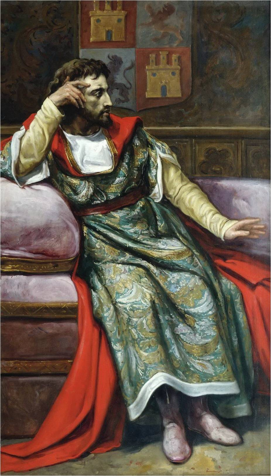 Retrato imaginario del rey Fernando IV de Castilla (1285-1312). Fue hijo del rey Sancho IV de Castilla y de la reina María de Molina. Durante su minoría de edad, su crianza y la custodia de su persona fueron encomendadas a su madre, la reina María de Molina, mientras que su tutoría fue confiada al infante Enrique de Castilla el Senador, hijo de Fernando III de Castilla. Durante su minoría de edad, y también durante el resto de su reinado, su madre procuró aplacar a la nobleza, se enfrentó a los enemigos de su hijo, e impidió en varias ocasiones que Fernando IV fuese destronado. Durante su reinado hubo de enfrentarse a la insubordinación de la nobleza, capitaneada en numerosas ocasiones por su tío, el infante Juan de Castilla el de Tarifa, y por Juan Núñez II de Lara, quienes fueron apoyados en algunas ocasiones por don Juan Manuel, nieto de Fernando III. Al igual que sus predecesores en el trono, Fernando IV prosiguió la empresa de la Reconquista y, aunque fracasó en su intento de conquistar Algeciras en 1309, conquistó la ciudad de Gibraltar ese mismo año, y en 1312 fue conquistado el municipio jienense de Alcaudete. Durante las Cortes de Valladolid de 1312, impulsó la reforma de la administración de justicia, y la de todos los ámbitos de la administración, al tiempo que intentaba reforzar la autoridad de la Corona en detrimento de la autoridad nobiliaria. Falleció en Jaén el día 7 de septiembre de 1312, a los veintiséis años de edad y fue sucedido por su hijo, Alfonso XI de Castilla. Fue sepultado en la iglesia de San Hipólito de Córdoba.